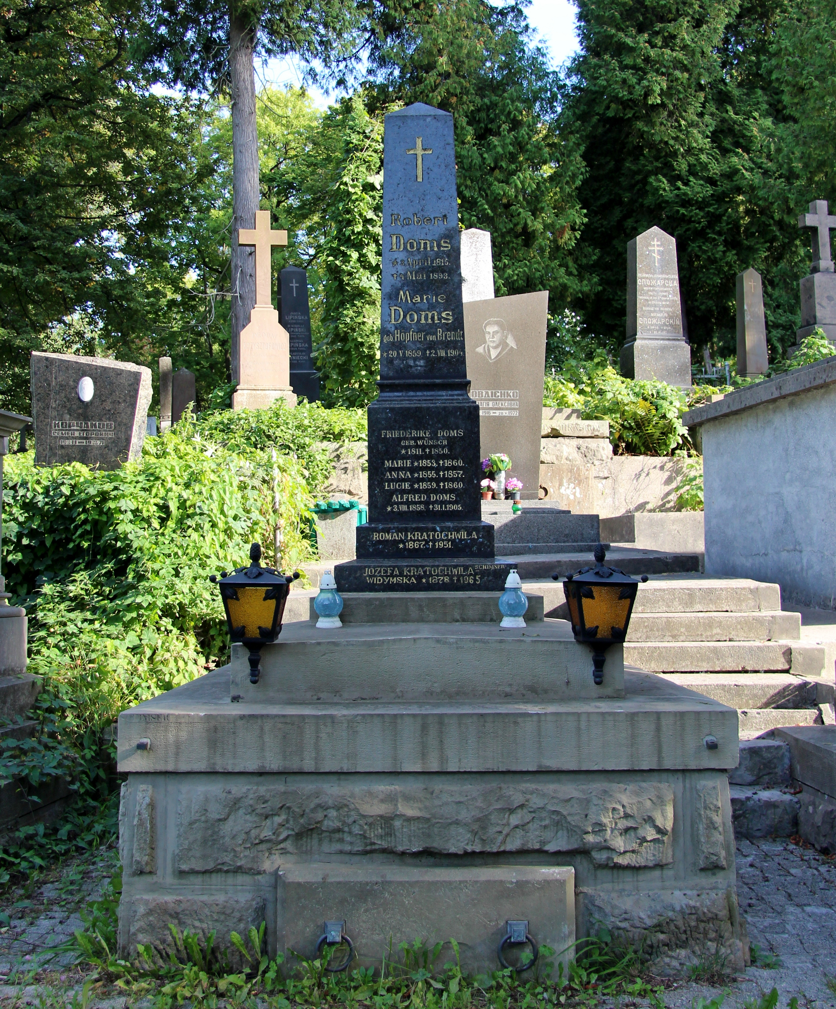 Ю. Кратохвіля - Відимська. 69 поле , Личаківський цвинтар.